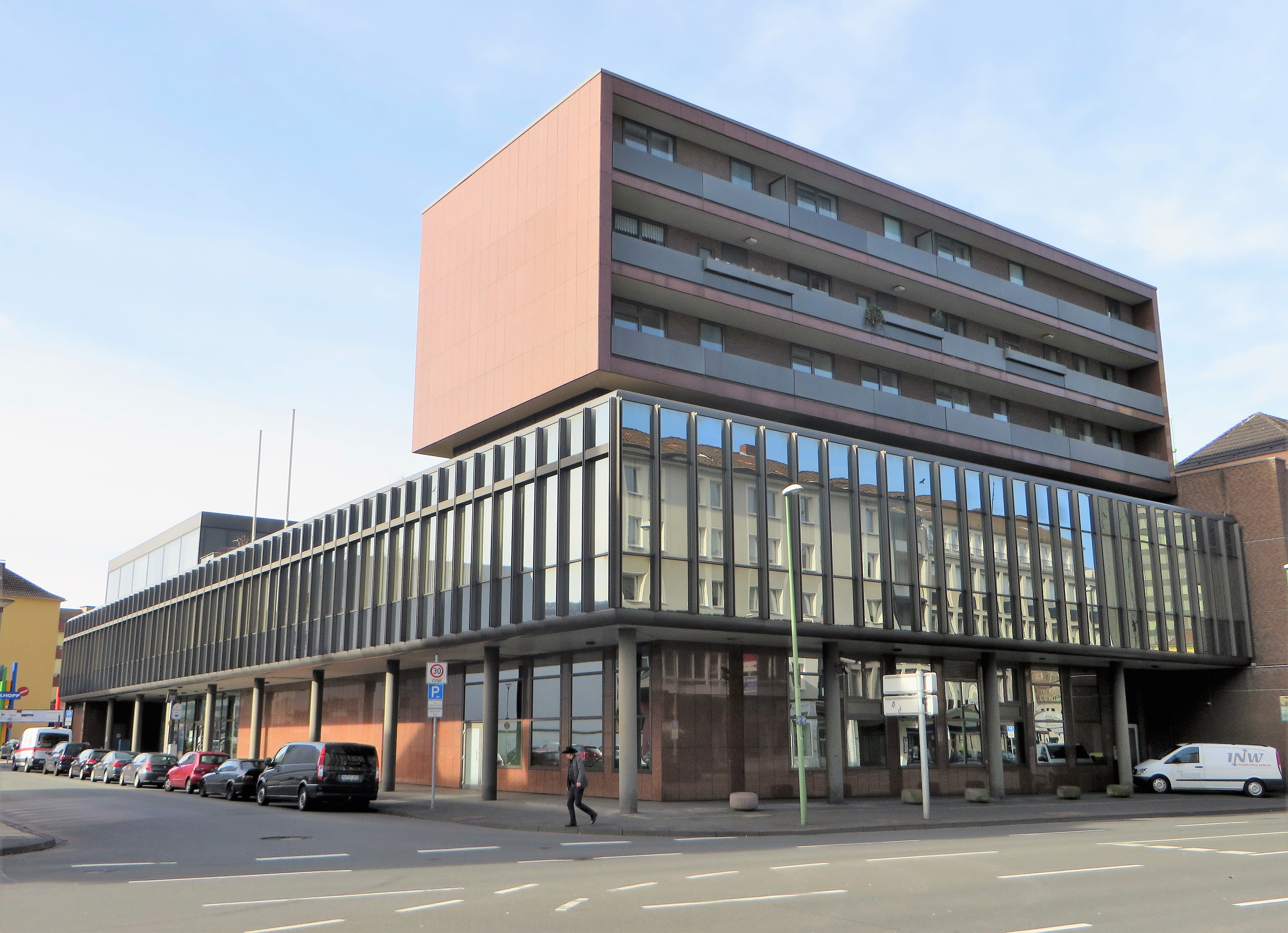 Deutsche Bundesbank Filiale Hagen, Grabenstraße 20 Ecke Körnerstraße.